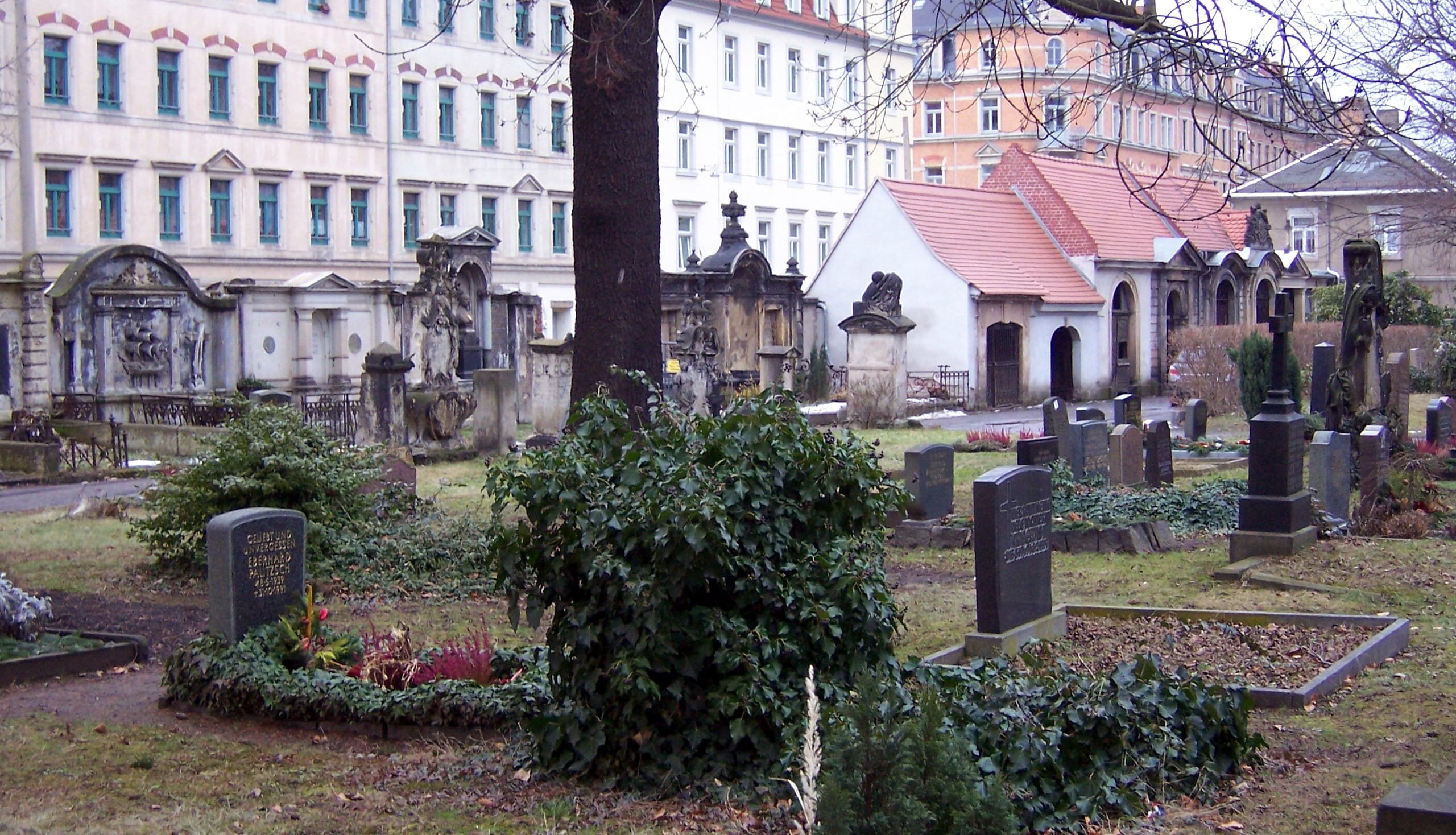 Blick auf den ältesten Teil des Inneren Neustädter Friedhofs in Dresden, rechts hinten ist ein Teil der barocken Grufthäuser erkennbar.